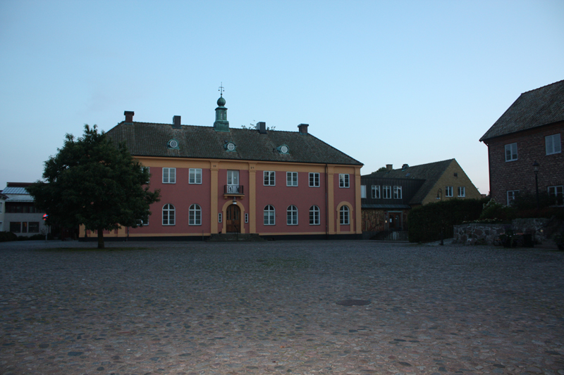 Tingtorget i Ängelholm med gamla tingshuset i bakgrunden